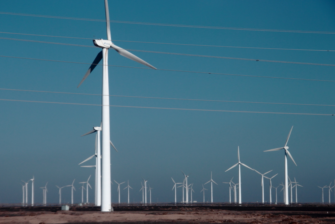 Guazhou, Jiuquan, Gansu, China